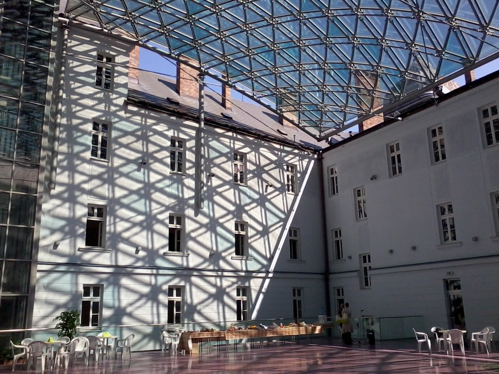 Здание школы